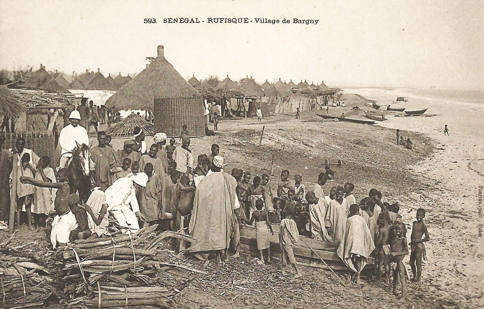 François-Edmond Fortier, Rufisque. Village de Bargny. Afrique Occidentale - Sénégal.